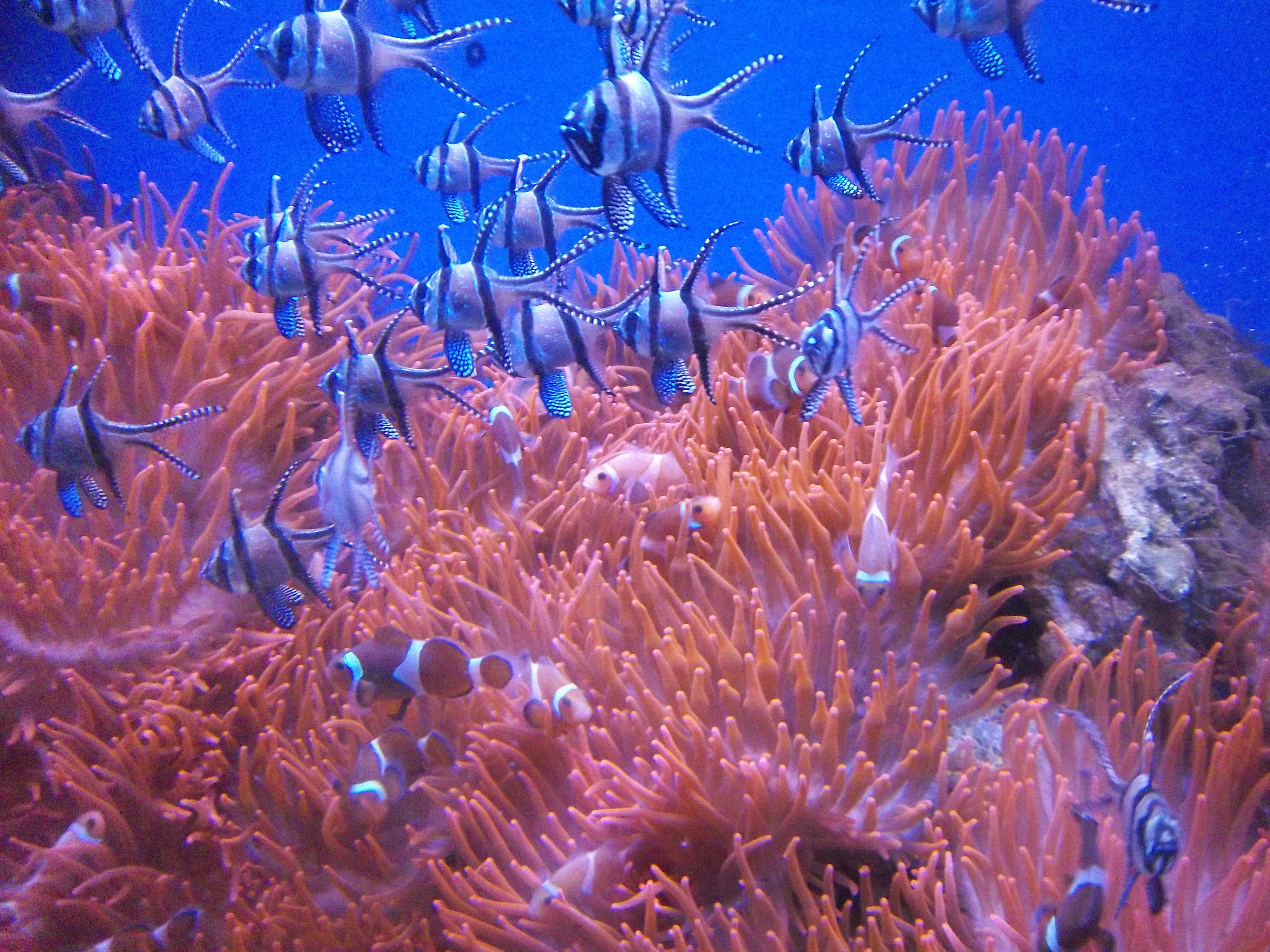 Pterapogon kauderni- Acquario di Genova, Italy